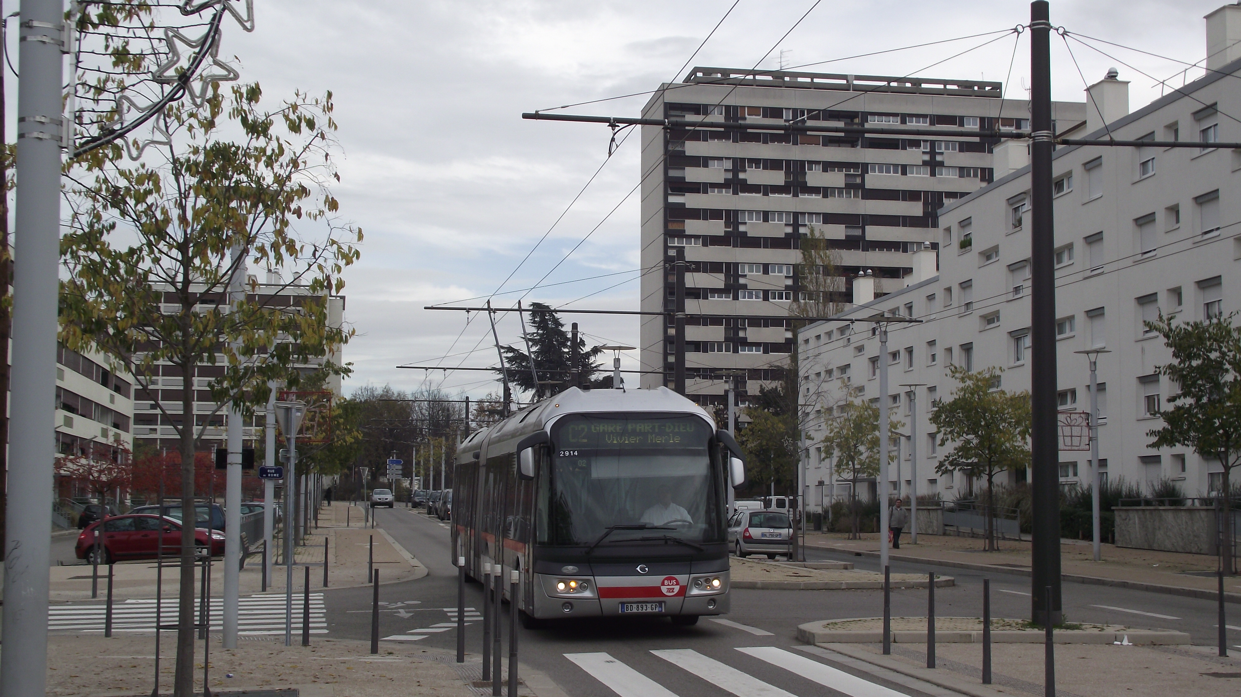 Trolleybus de la ligne C2 à Rillieux Semailles